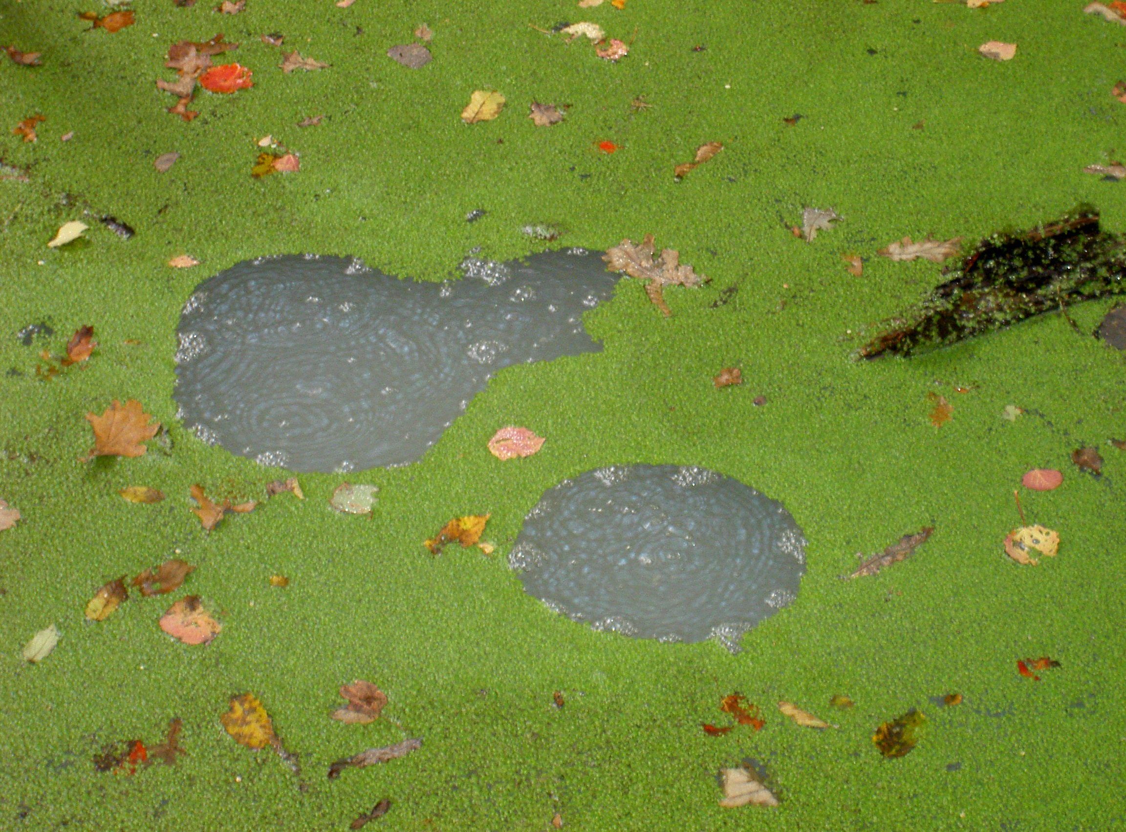 Lieu-dit Fontaine des vertues à Saint-pariz-le-chatel (58-FR) gros plan sur un bouillonnement